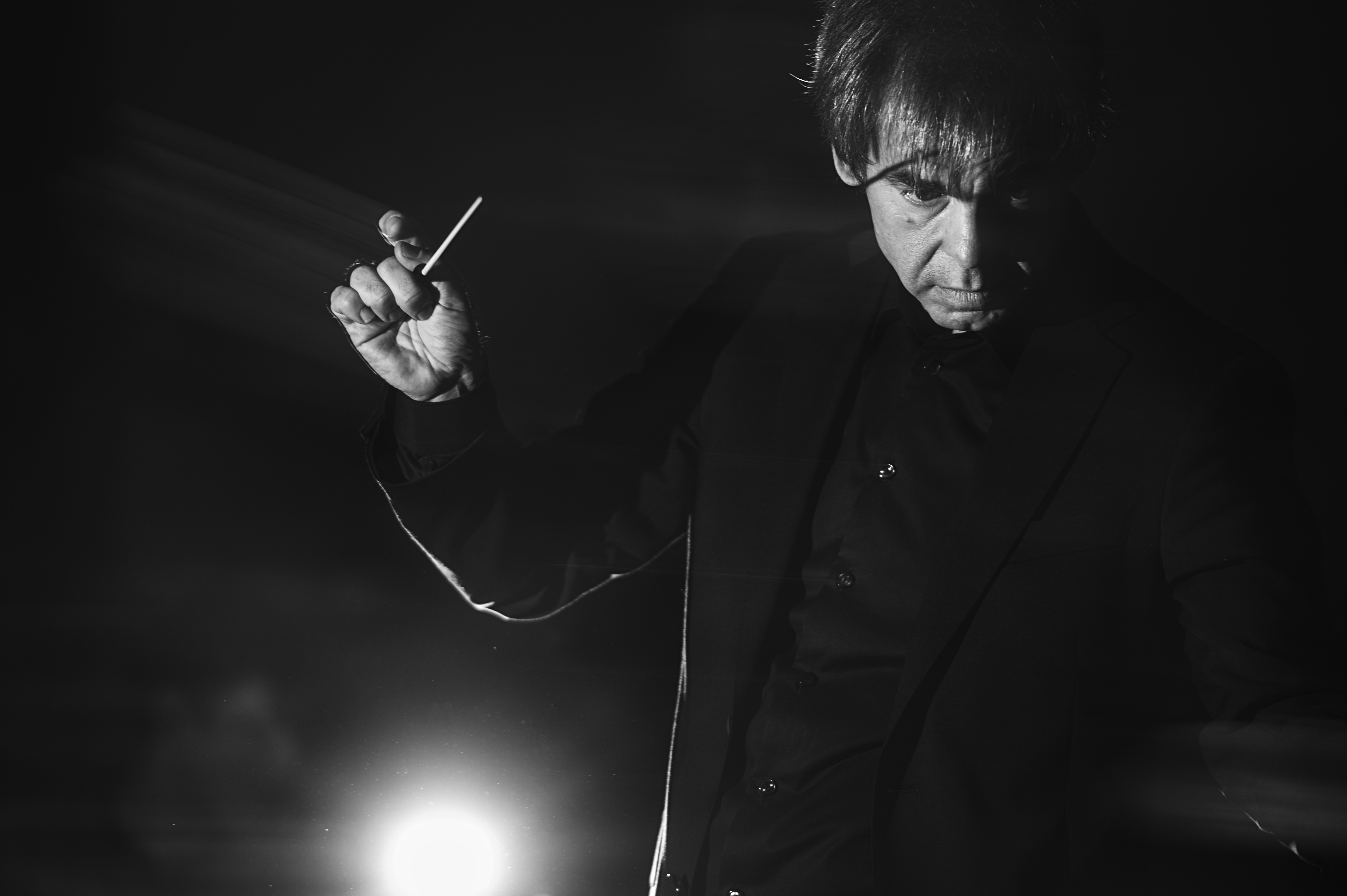 Ingar Bergby, dirigent. Foto: Benjamin A. Ward / benjaminward.no